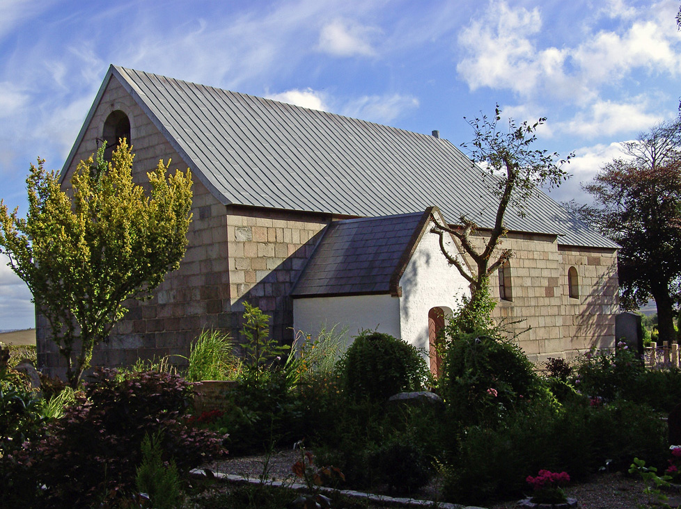 fra sydvest